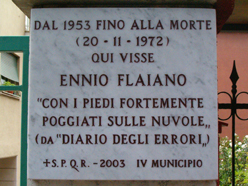 La targa dedicata a Flaiano a Via Montecristo (Roma - Montesacro)